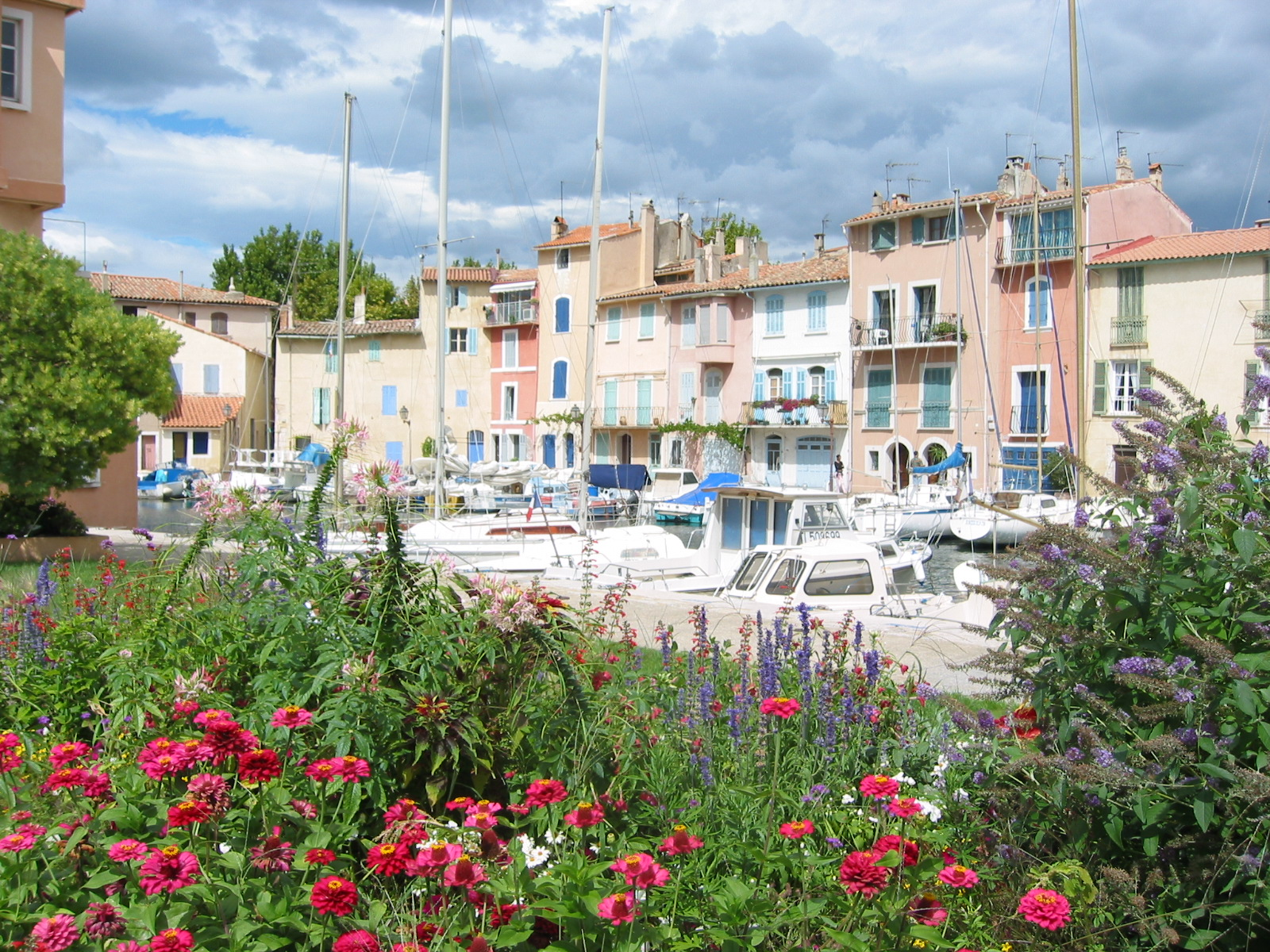 Martigues, Bouches-du-Rhône, France Quartier de l'île sur le canal, lieu dit : Le miroir aux oiseaux